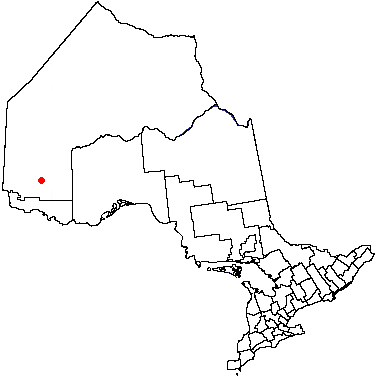 Volapük: Topam in provin: Ontario.